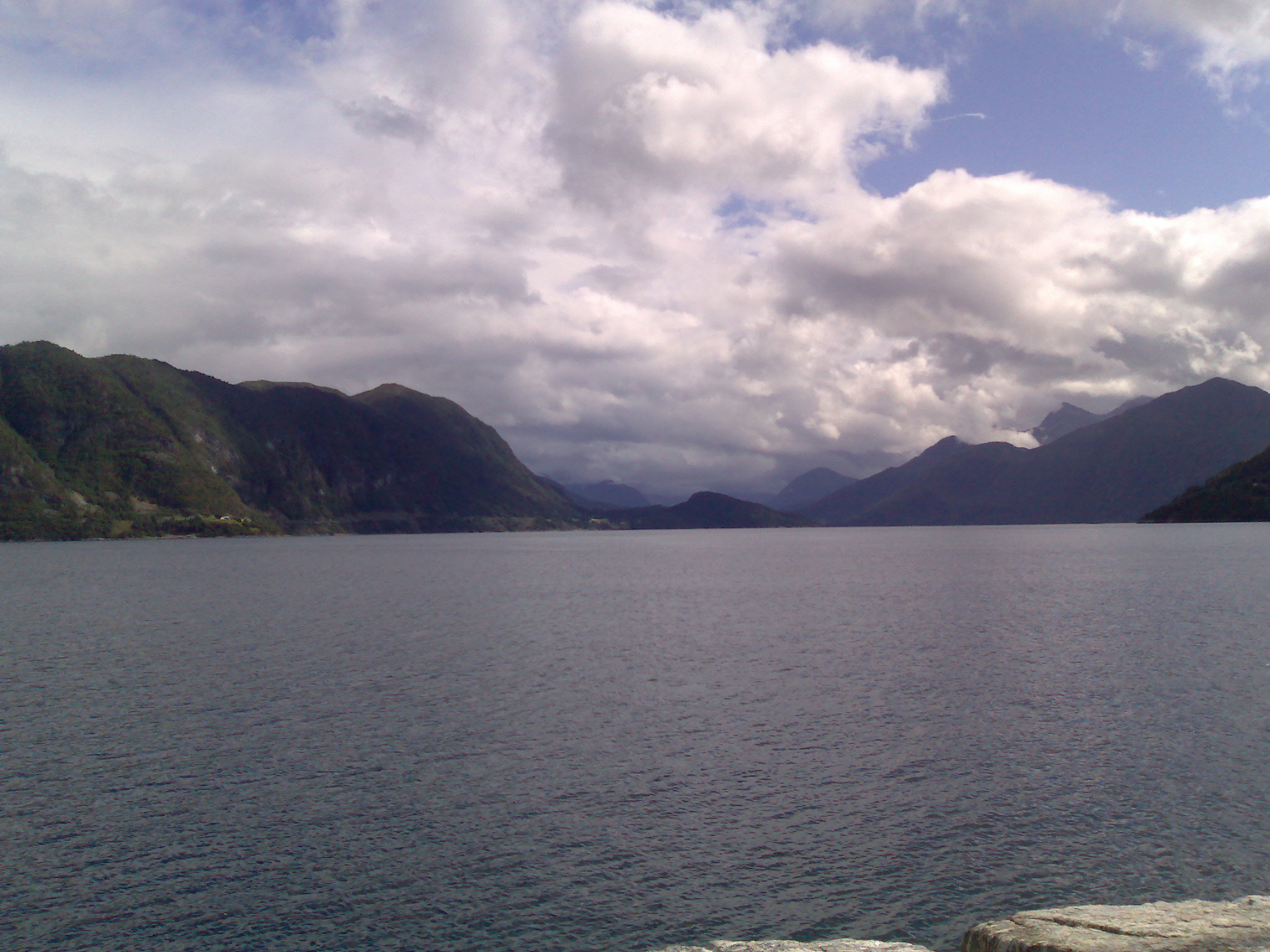 Voldsfjorden sett fra Folkestad.